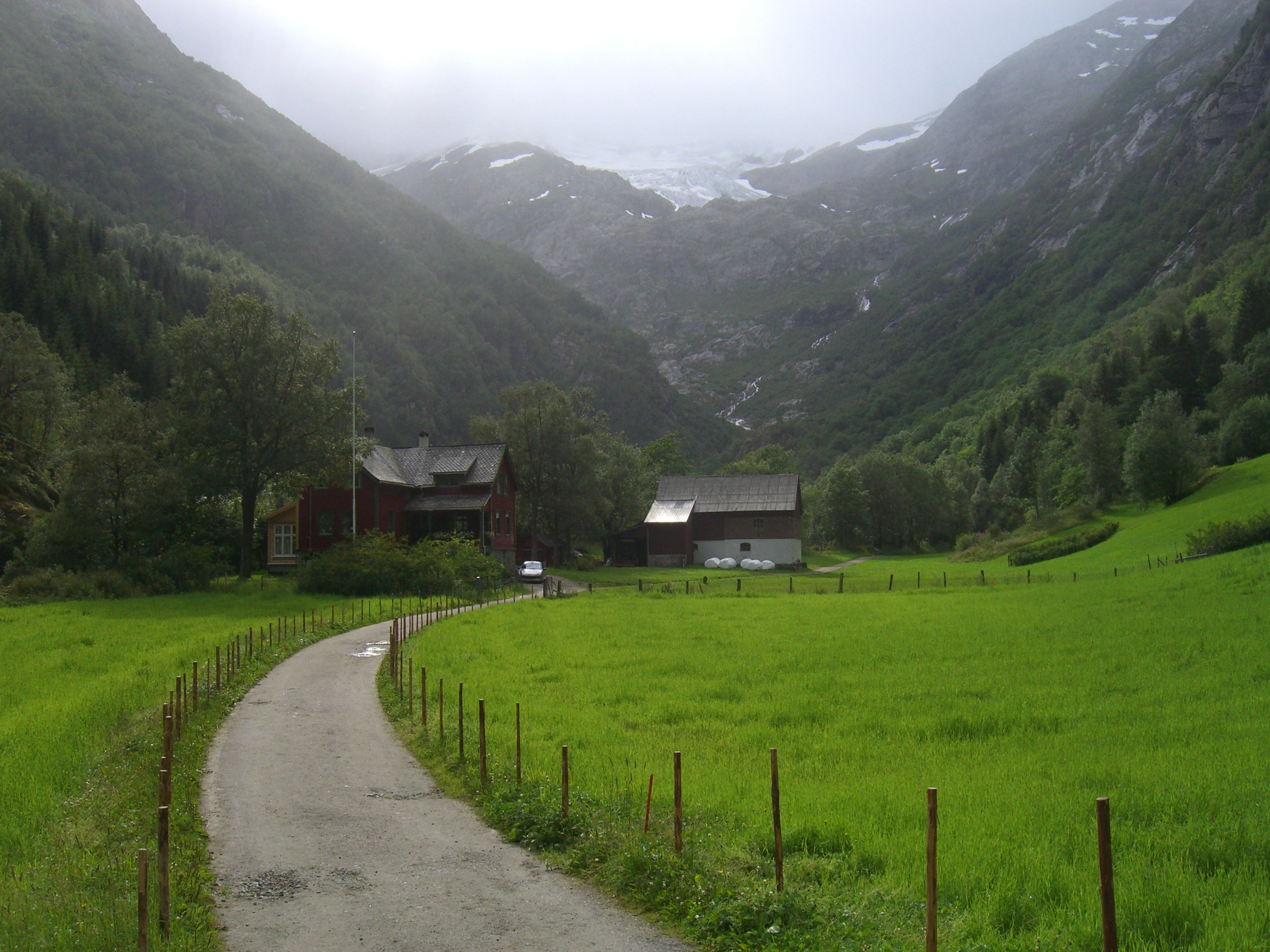 no: Buerdalen, Buerbreen (Folgefonna) kan skimtast øvst i bakgrunnen.